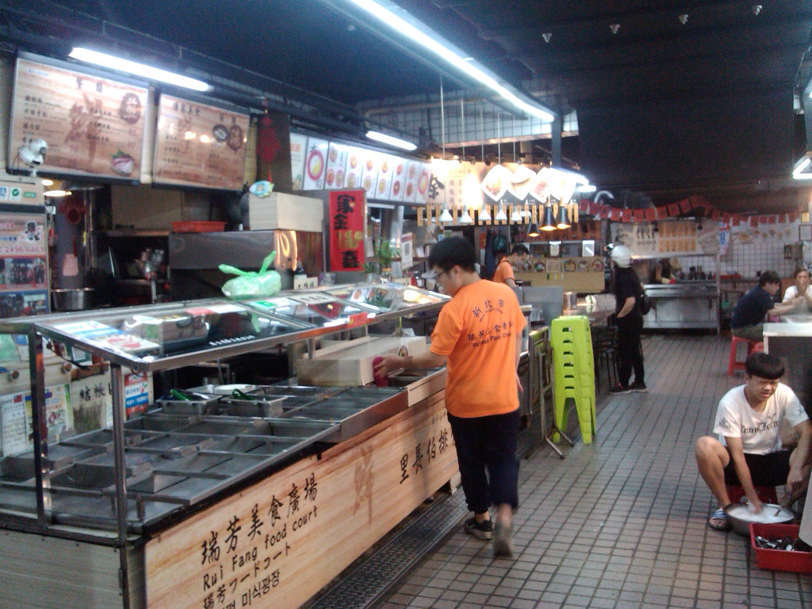 位於瑞芳區民生街與民權街6巷口 經營風格類似大型機構附設的美食街與一般傳統市場的混合體 亮點在於一般傳統果菜市場是販賣生食 而該處則以販賣現成的餐點為主